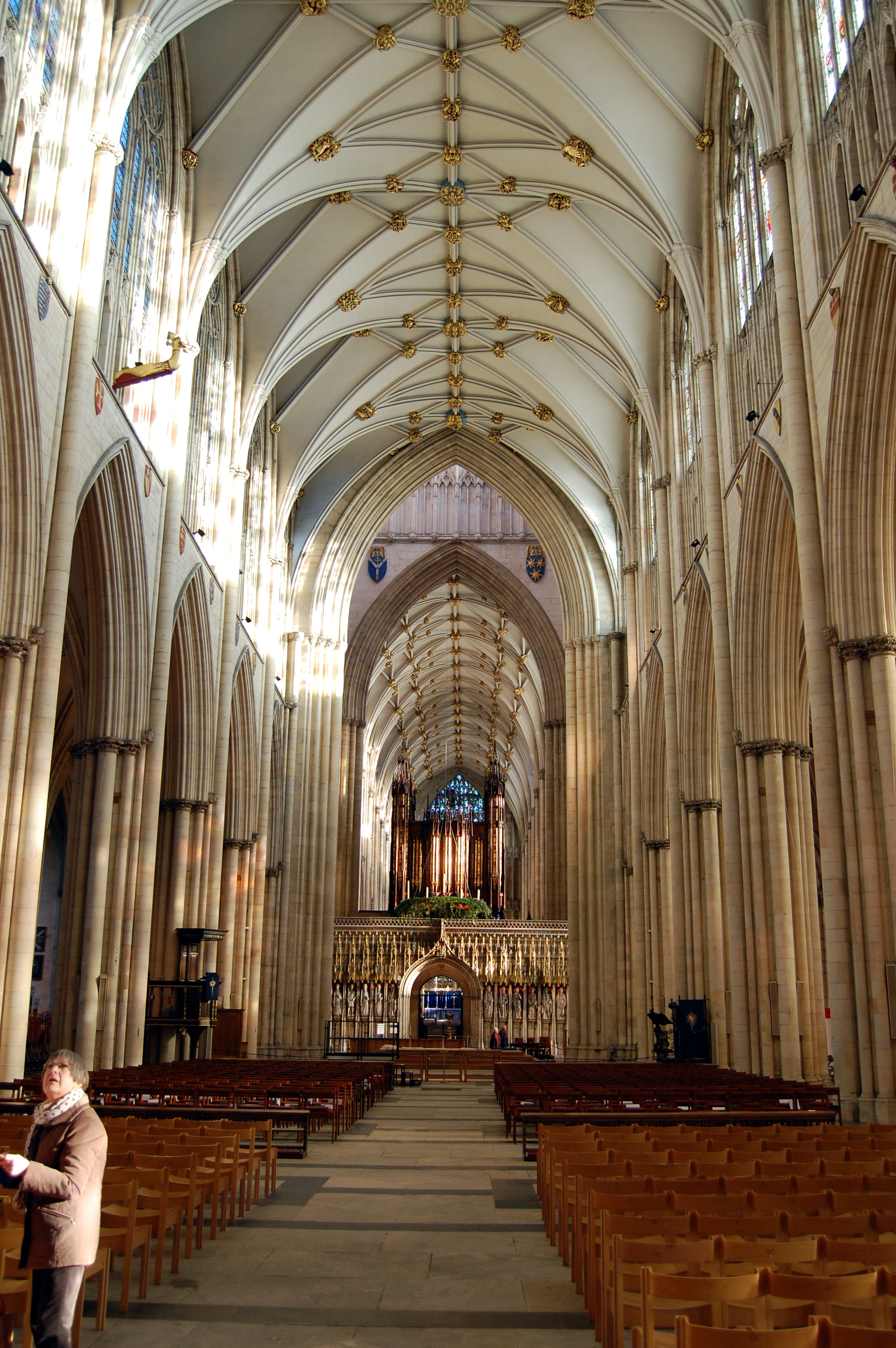 Inside York Minster.